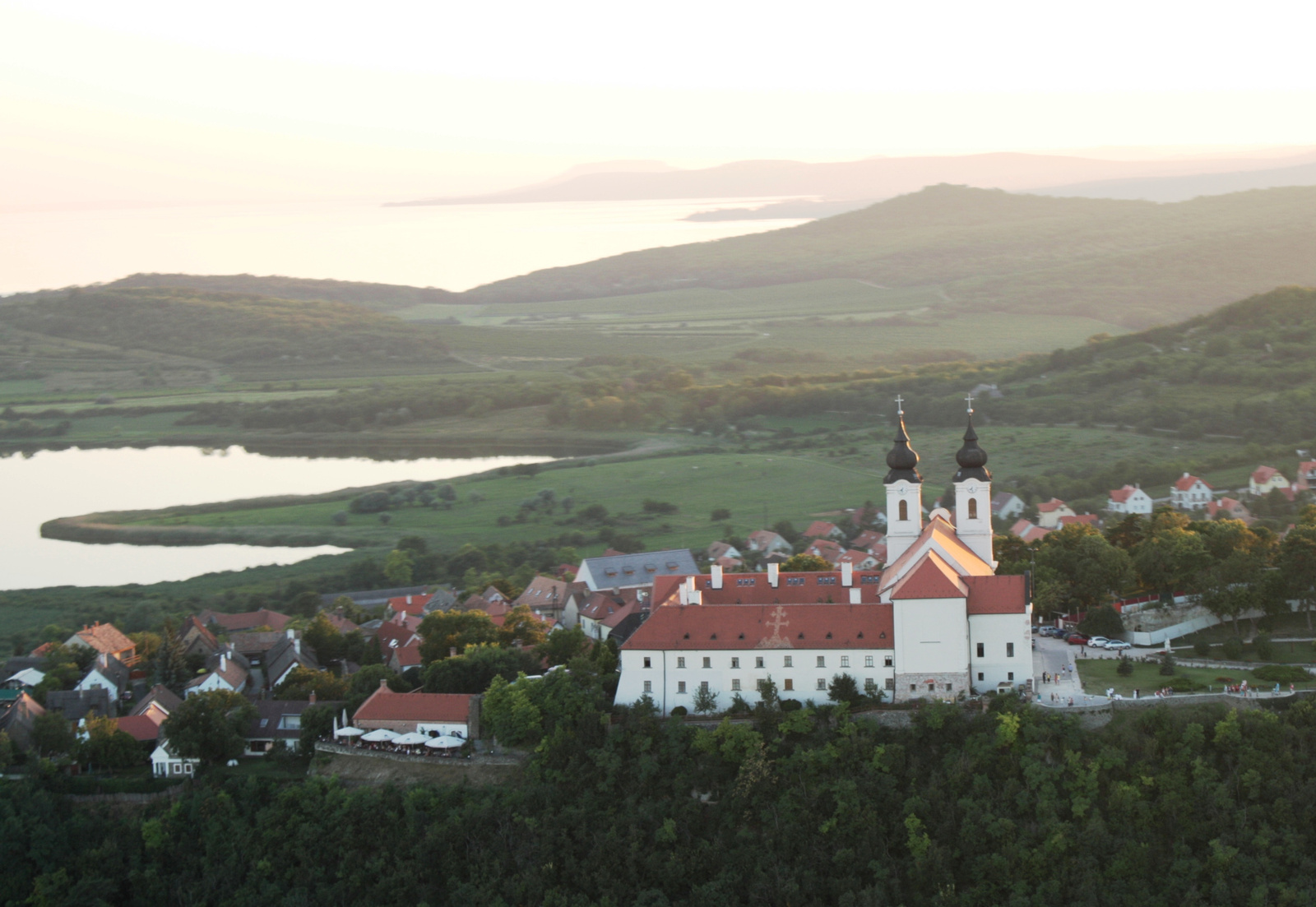 egykori bencés apátság kolostora (Tihany, Batthyány u. 36.) This is a photo of a monument in Hungary. Identifier: 10484